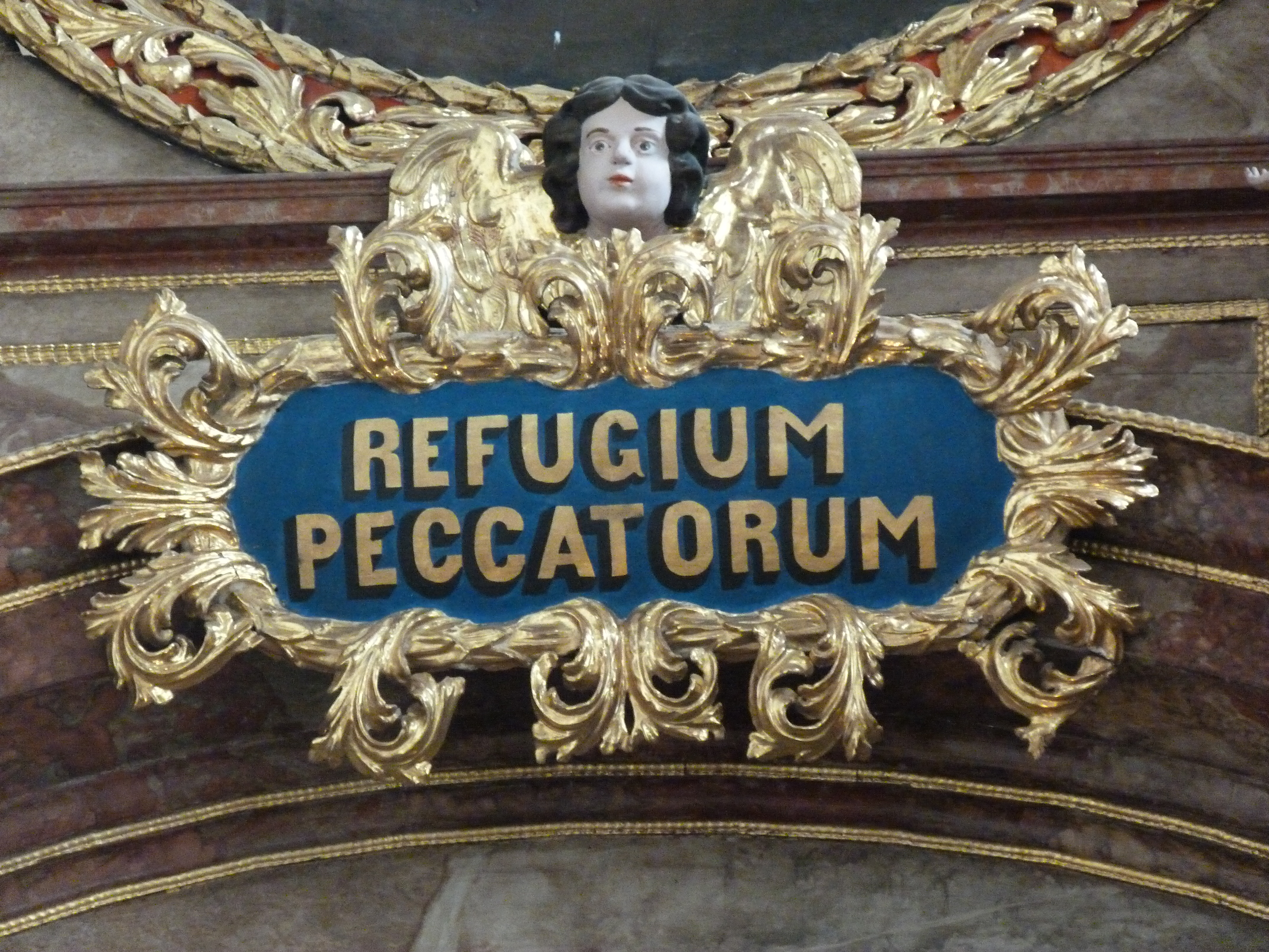 A felvétel 2014. december 4-én készült Boldogasszonyban. Kegytemplom. A hagyomány szerint II. András király uralkodása alatt a Fertő úgy kiöntött, hogy több falut elnyelt a víz. Ezek helyett alapítottak települést 1240-ben. 1324-ben "Zenmária" néven említik először. Területén már az ókorban település volt. Mosonszentandrás felé eső határrészén jelentős római településre utaló leletek kerültek elő. Mária kegyhelye már a 13. században ismert volt. Régi temploma a 14. században épült, ezt a török 1529-ben lerombolta. Nagyboldogasszony szobrát 1661-ben hozták ide a Fraknói vár várkápolnájából, ahol az Eszterházyak tulajdonában volt. Az Eszterházy Pál által 1668-ban újjáépíttetett templomát és kolostorát 1683-ban a török ismét elpusztította. 1696 és 1702 között az olasz Francesco Martinelli tervei szerint bővítve építették újra fel. Régi híres búcsújáróhely. ©© Derzsi Elekes Andor, Budapest, 2014, Published in the Metapolisz DVD line. You are authorised to use this photo under Creative Commons – even for commercial, for profit purposes. The photo must be attributed to Derzsi Elekes Andor. All of the photos and vids in the Metapolisz DVD line are under Creative Commons and can be used even for commercial – for profit – purposes. Recommended Citation Derzsi Elekes Andor: Metapolisz DVD line